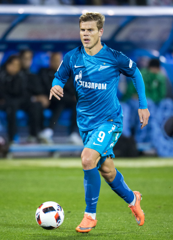 Александр Кокорин — российский футболист